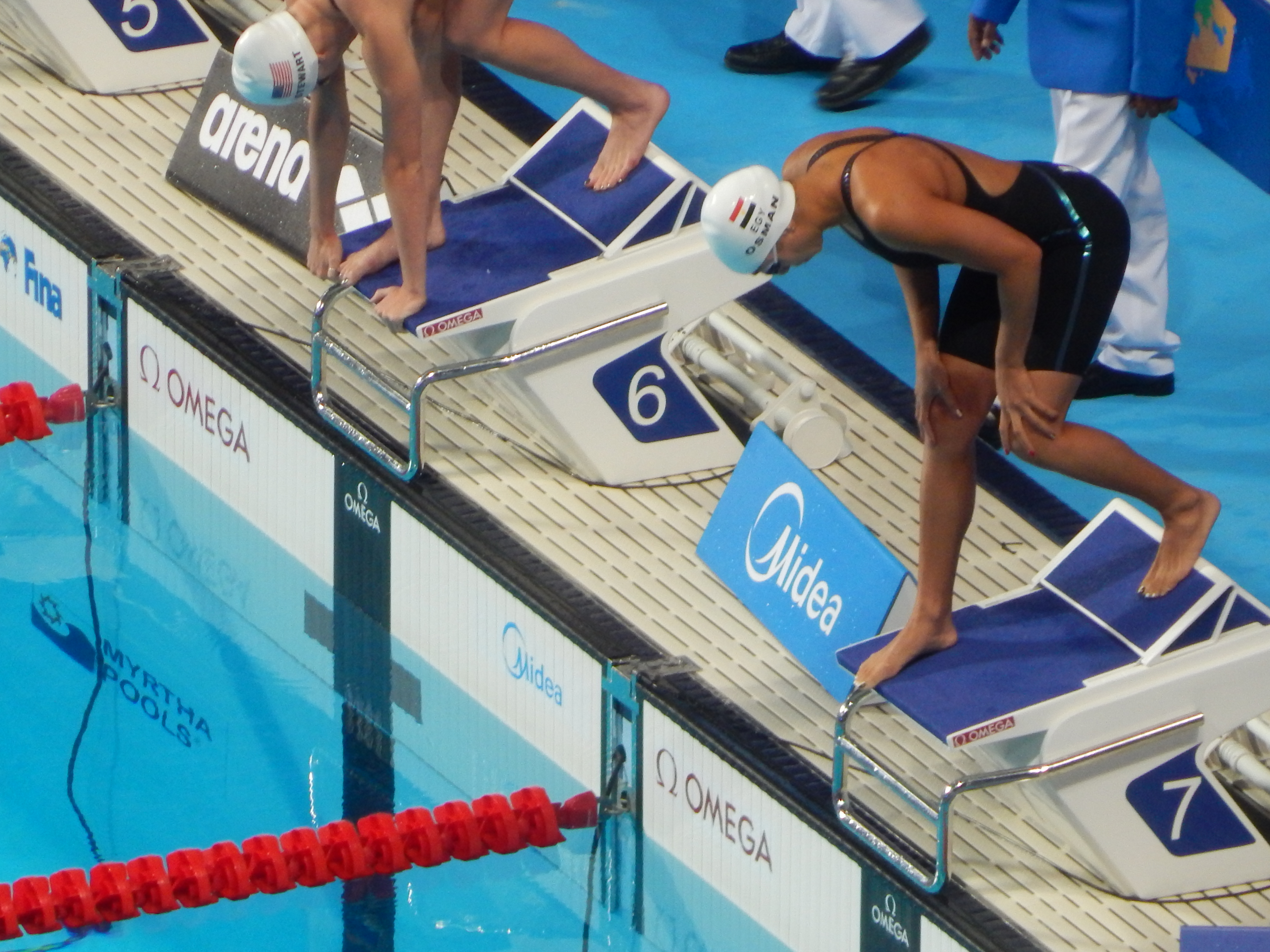 Заплыв на чемпионате мира в Казани баттерфляем 50 метров полуфинал